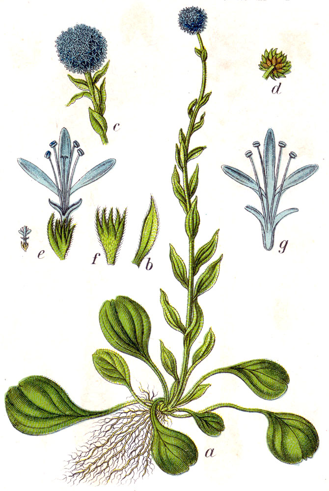 Globularia punctata Lapeyr., syn. Globularia vulgaris auct. non L. s. str. Original Caption Gemeine Kugelblume, Globularia vulgaris